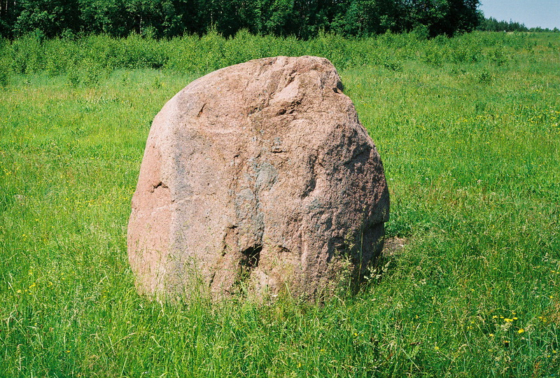 Войневічы. Войневіцкі чортаў камень